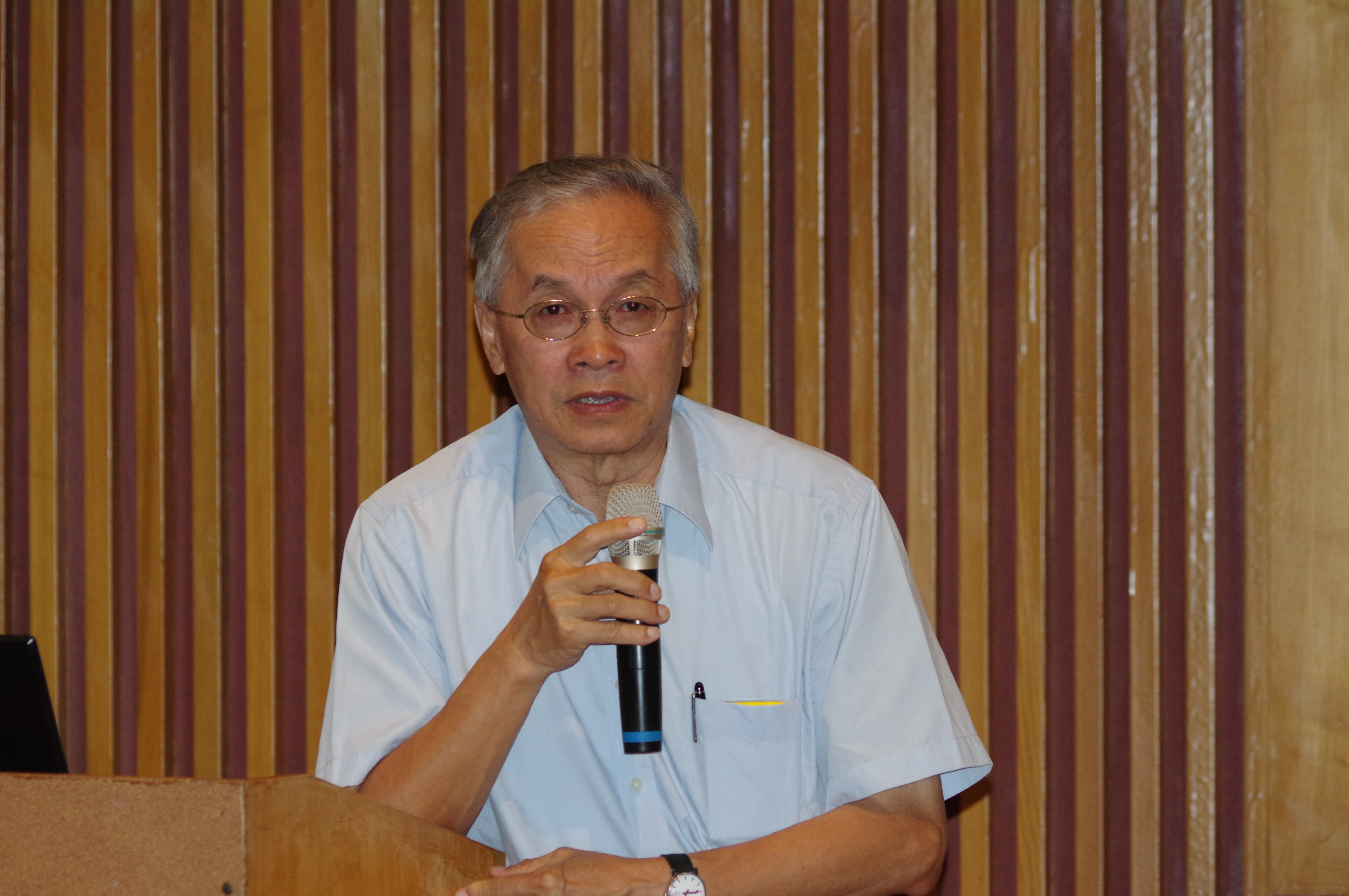 德國國籍華人天文學家葉永烜。